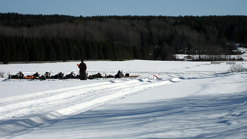 Fältskytte 6,5mm, Trosa-Vagnhärads Skyttegille